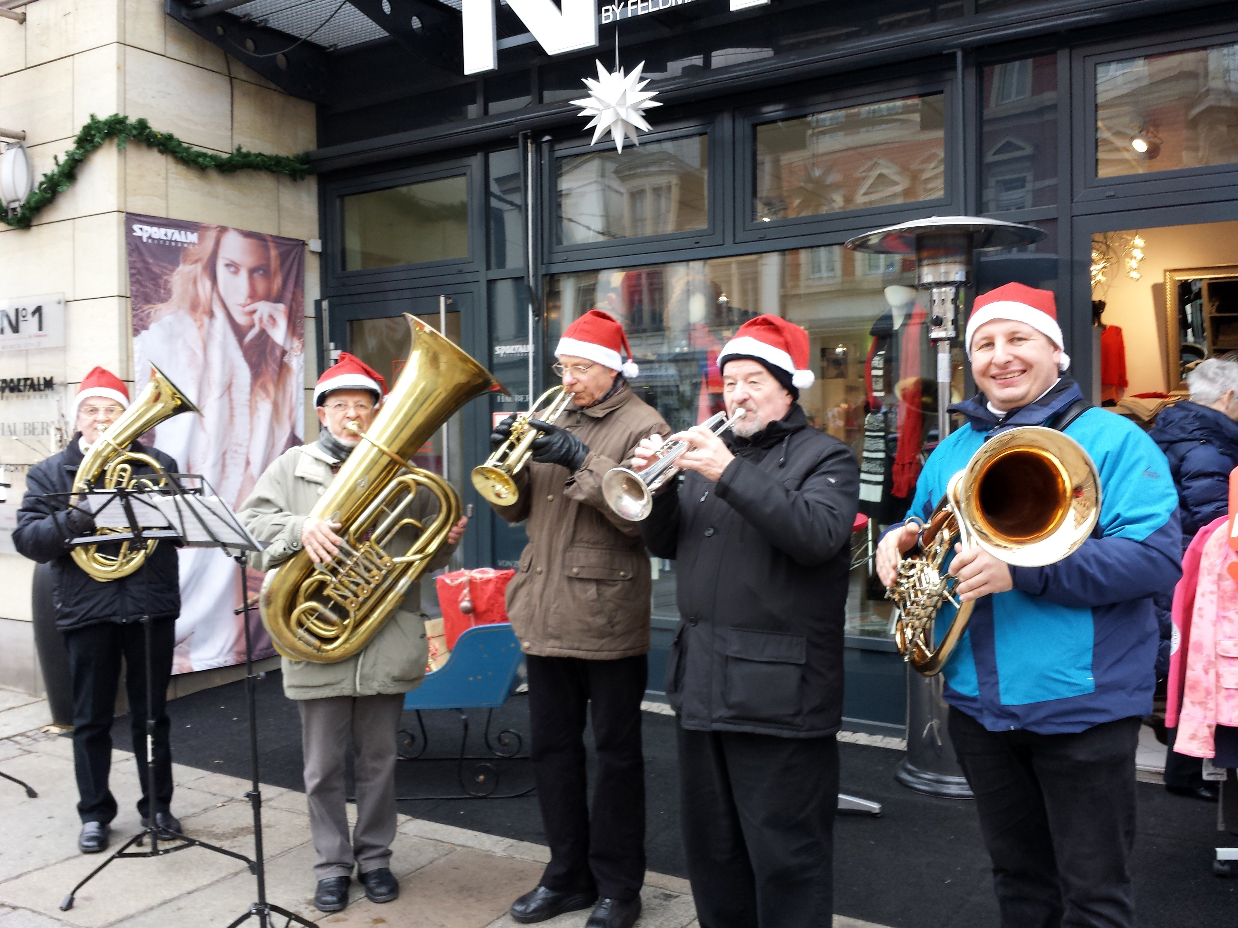 Adventskapelle am Schillerplatz in Dresden 2014